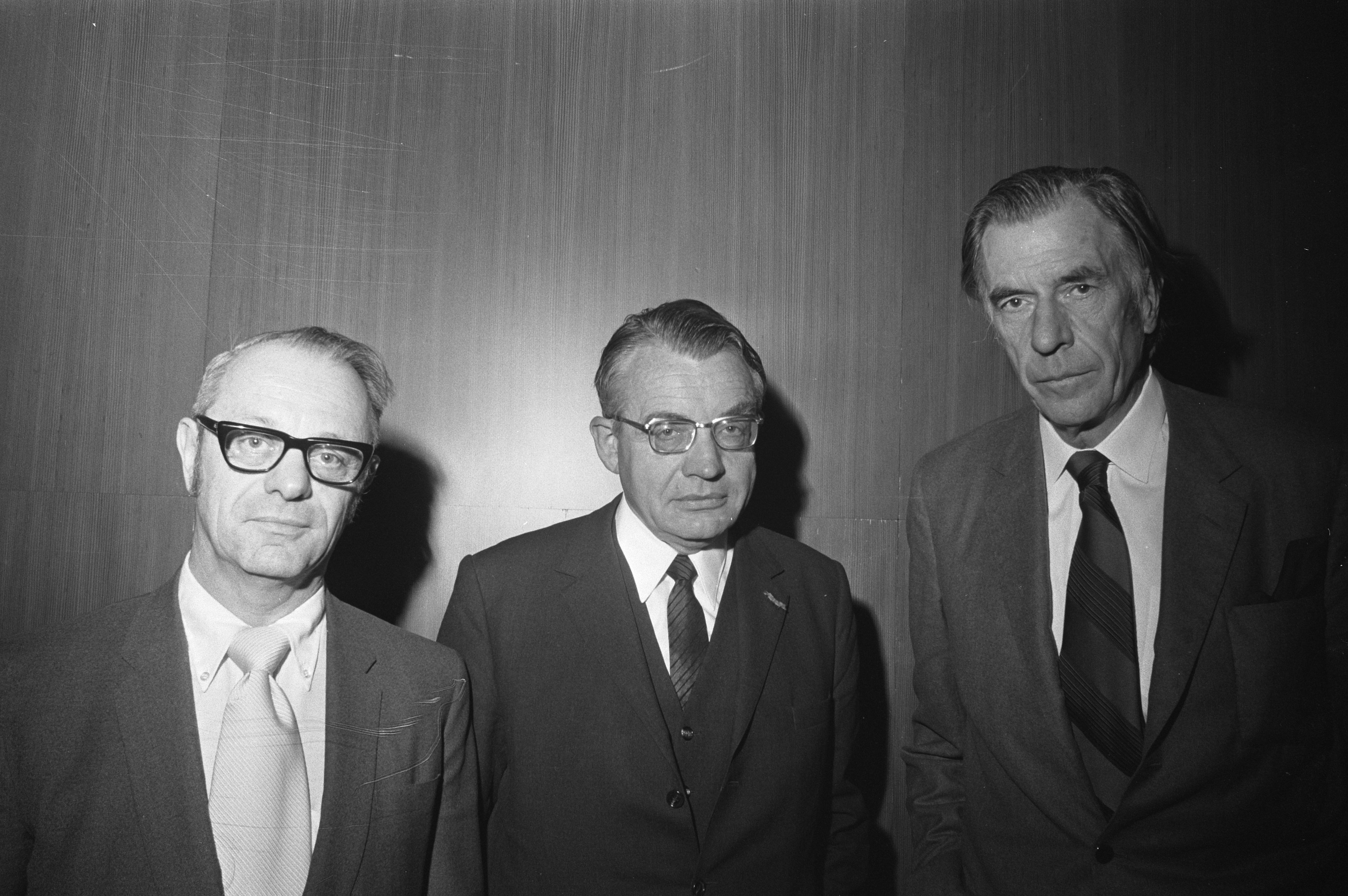 Collectie / Archief : Fotocollectie Anefo Reportage / Serie : [ onbekend ] Beschrijving : Conferentie met Ass. Business Ltd. en Verbond Ned. Ondernemingen in RAI A'dam, prof. Ansoff , prof. Casimir , prof. Galbrait Datum : 25 november 1971 Locatie : Amsterdam, Noord-Holland Trefwoorden : conferenties Instellingsnaam : RAI Fotograaf : Mieremet, Rob / Anefo Auteursrechthebbende : Nationaal Archief Materiaalsoort : Negatief (zwart/wit) Nummer archiefinventaris : bekijk toegang 2.24.01.05 Bestanddeelnummer : 925-1743